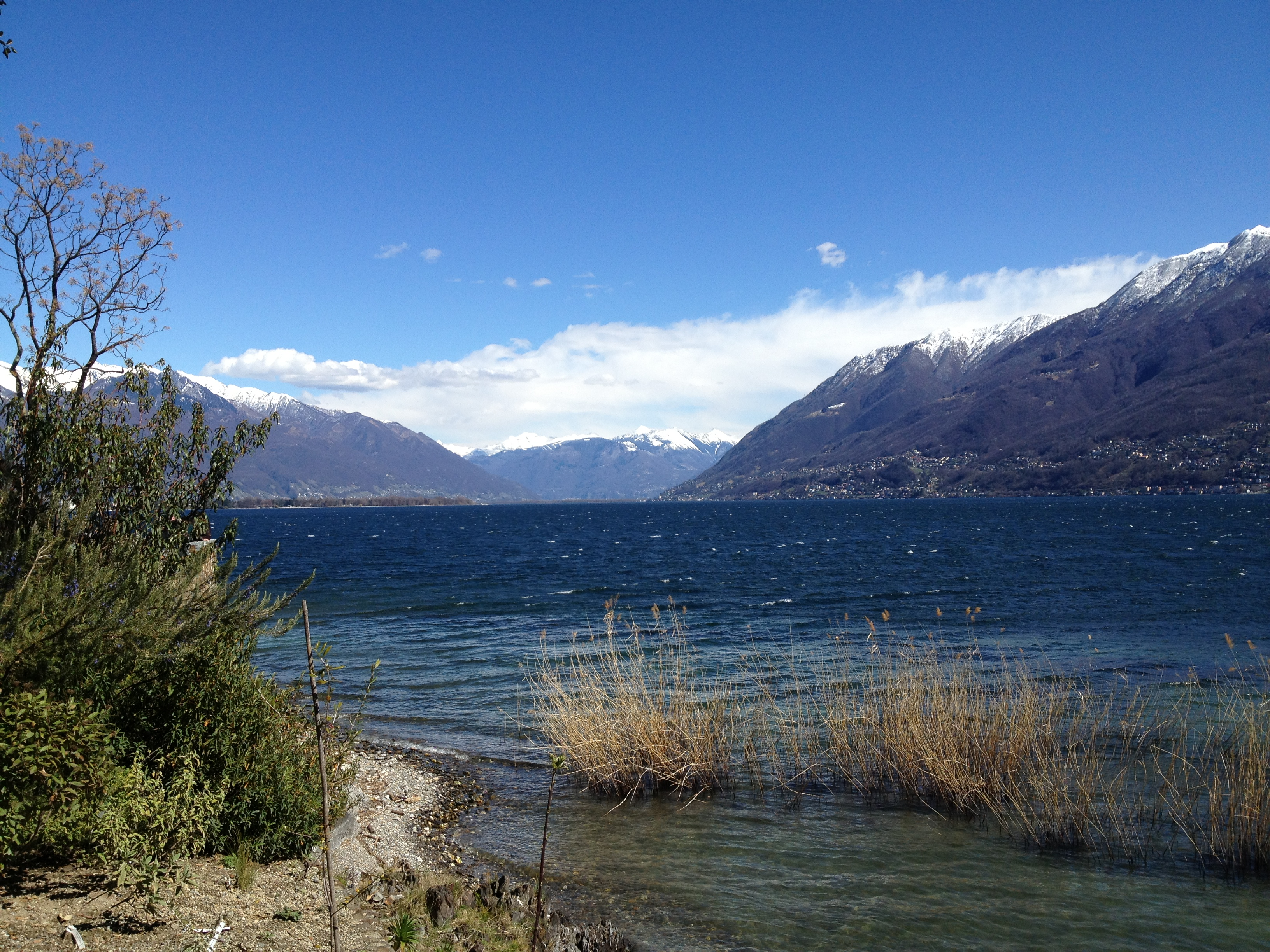 Lago Maggiore auch Langensee